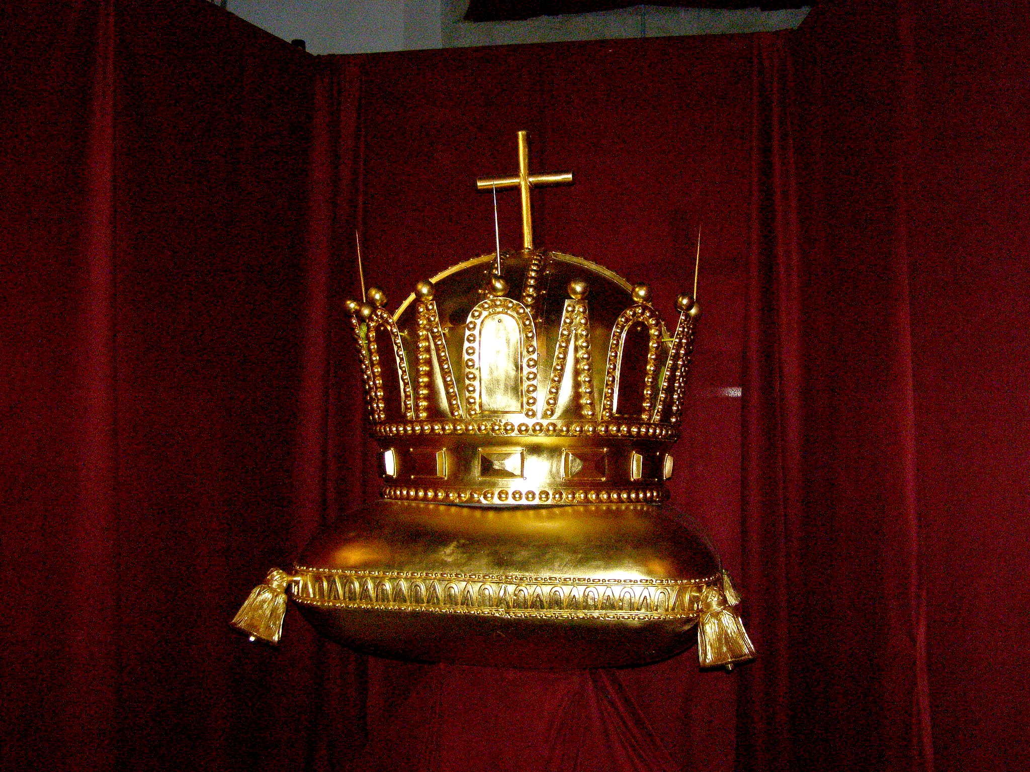 Vystavený model uhorskej kráľovskej koruny po rekonštrukcii v septembri 2010